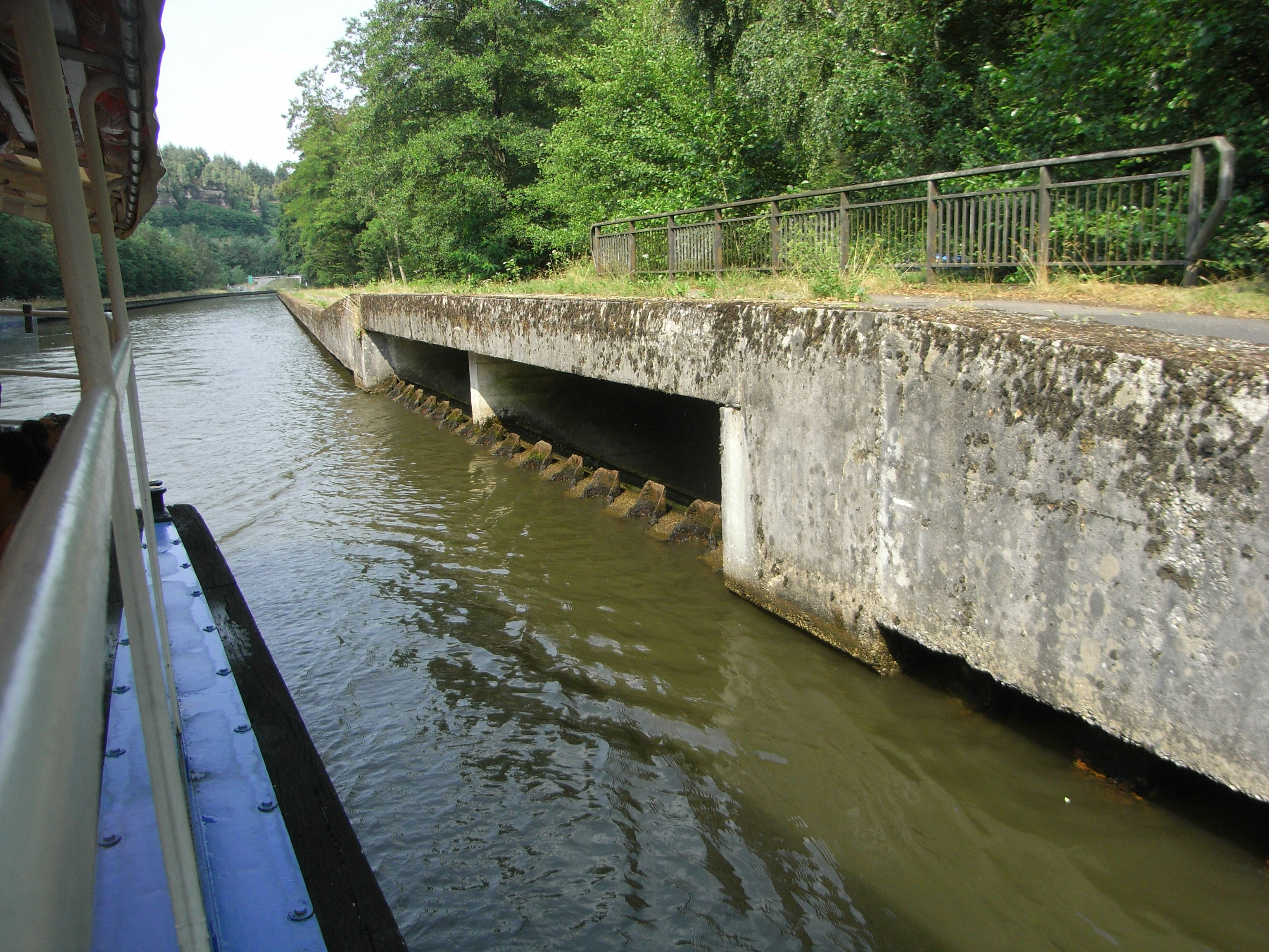 Déversoir pour l'évacuation du surplus des eaux du bassin bas du plan incliné d'Arzviller, sur le canal de la Marne au Rhin (France)